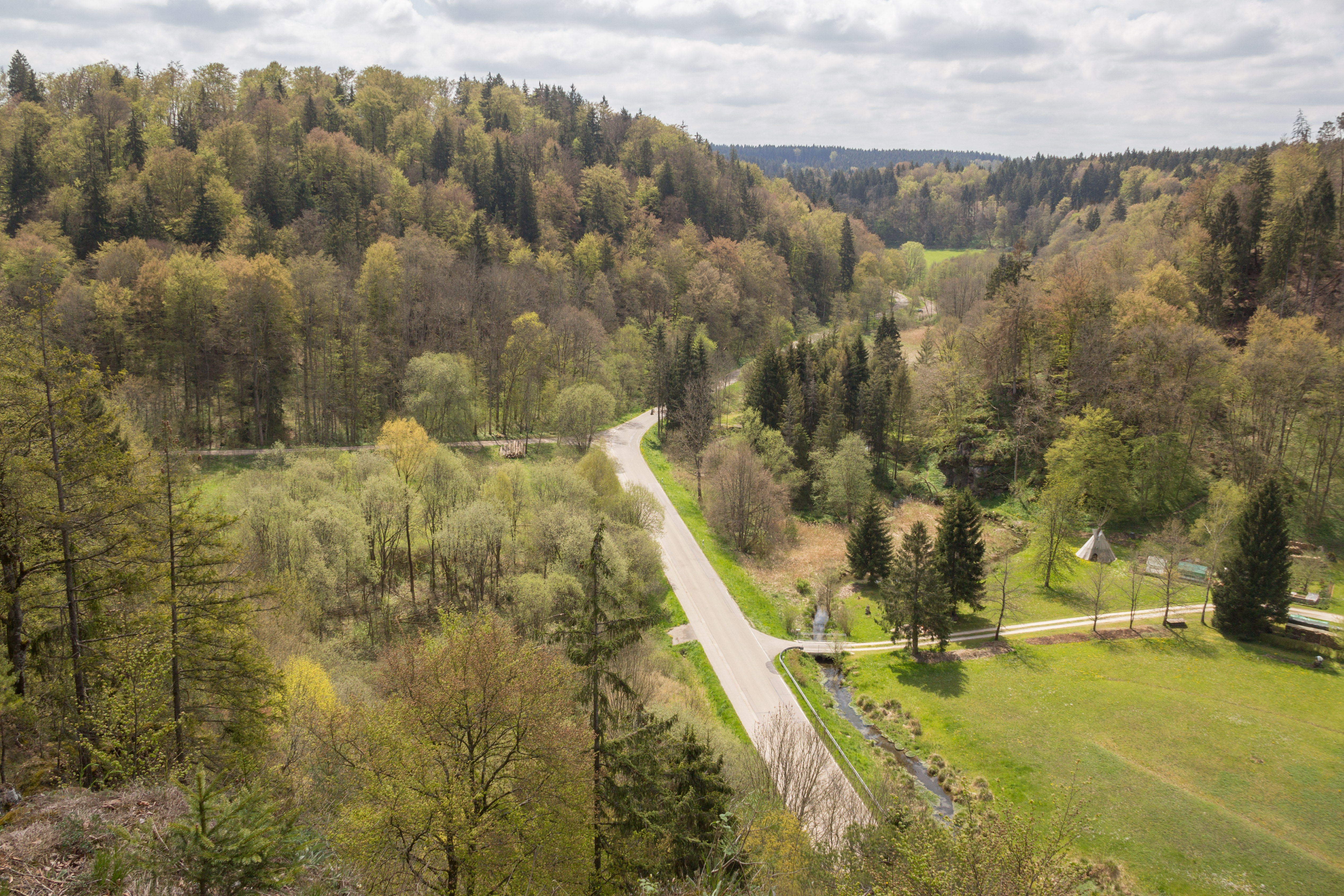 Schambachtal, Blick von der Schamleite, Schambach (Altmühl, Arnsberg), Landschaftsschutzgebiet und Naturpark Altmühltal, FFH-Gebiet Mittleres Altmühltal mit Wellheimer Trockental und Schambachtal